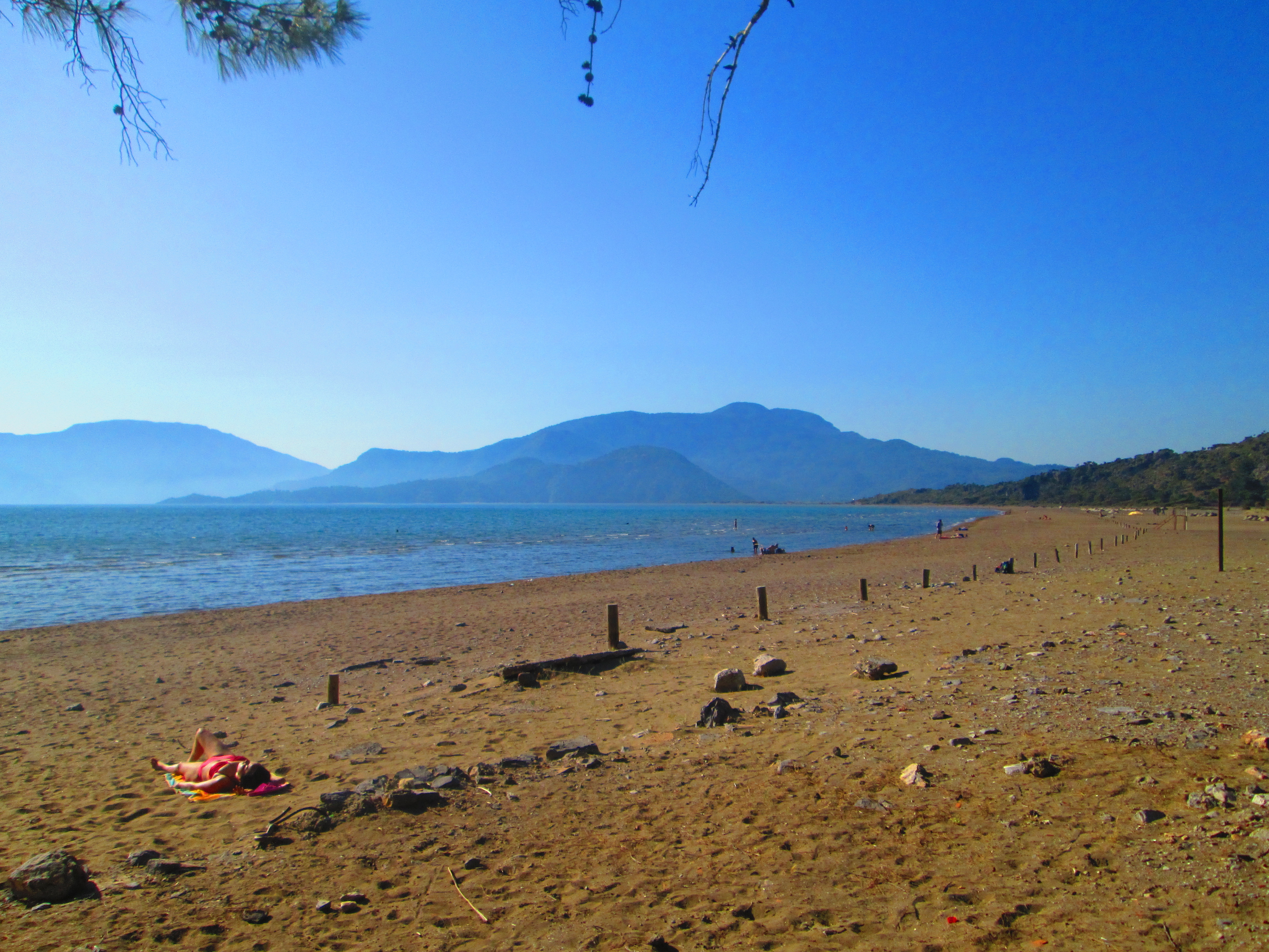 İztuzu Beach